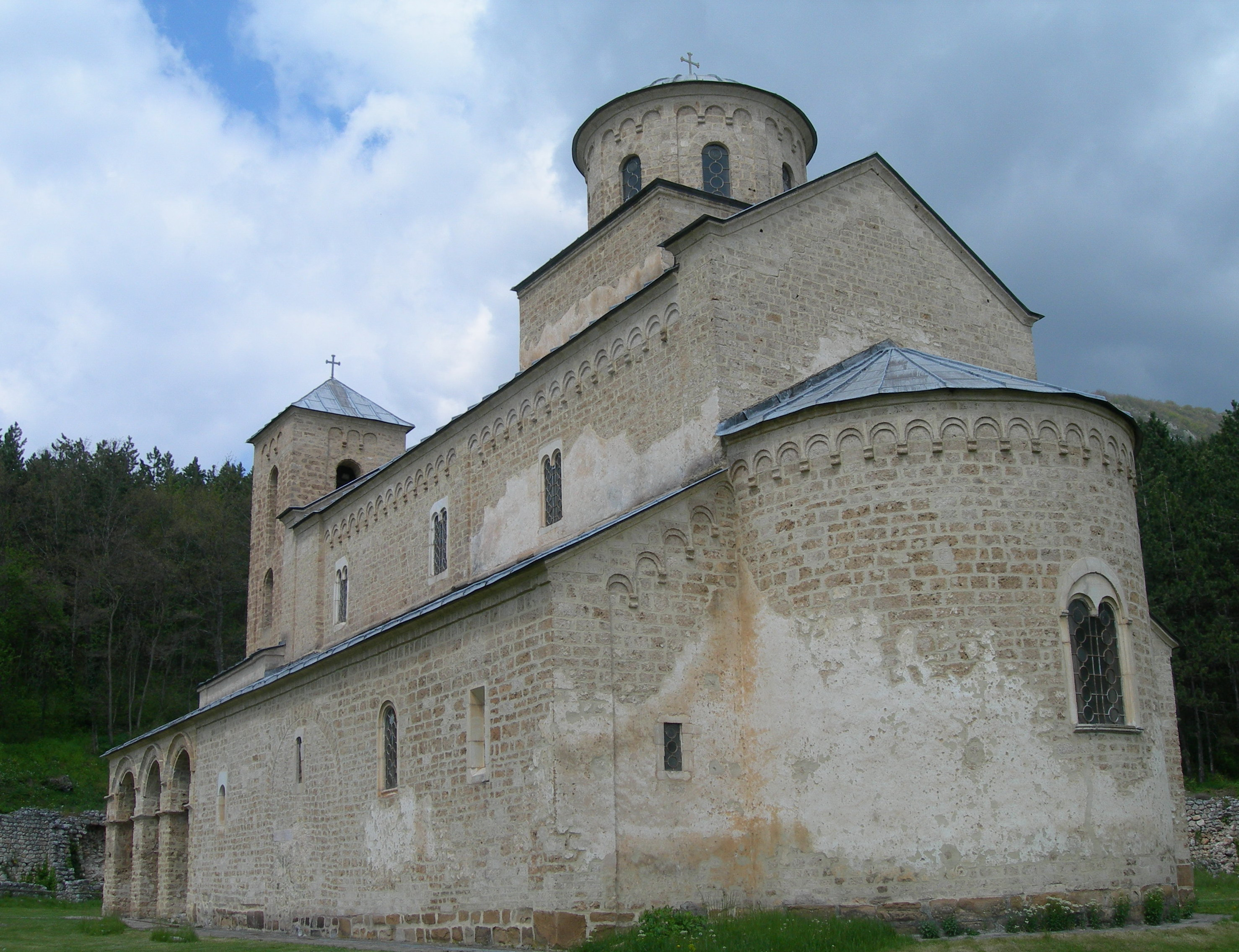 Manastir Sopocani